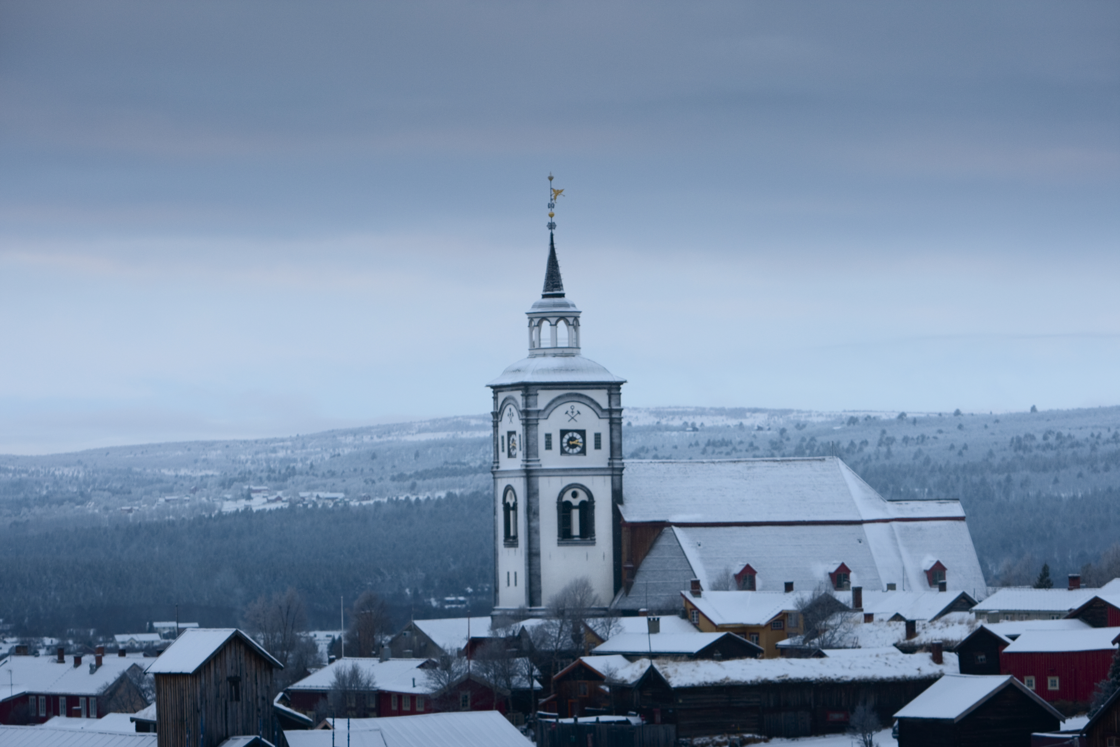 Røros preview